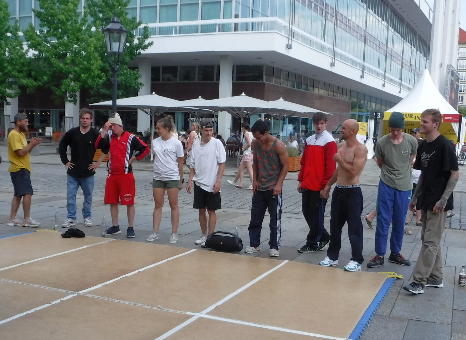 The Saxonz bei den Dresdner Kulturinseln 2020